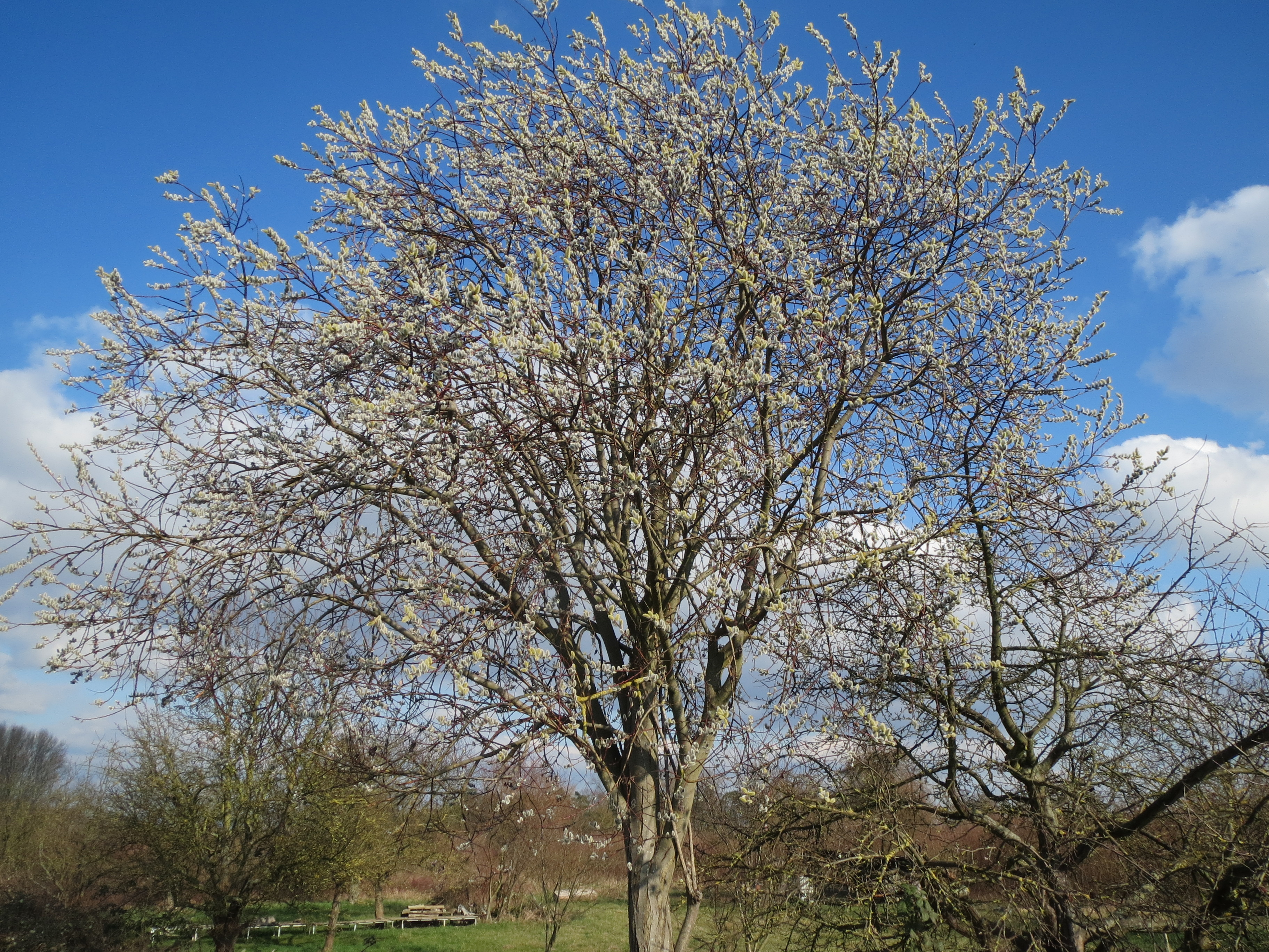 Sal-Weide (Salix caprea) im Hockenheimer Rheinbogen